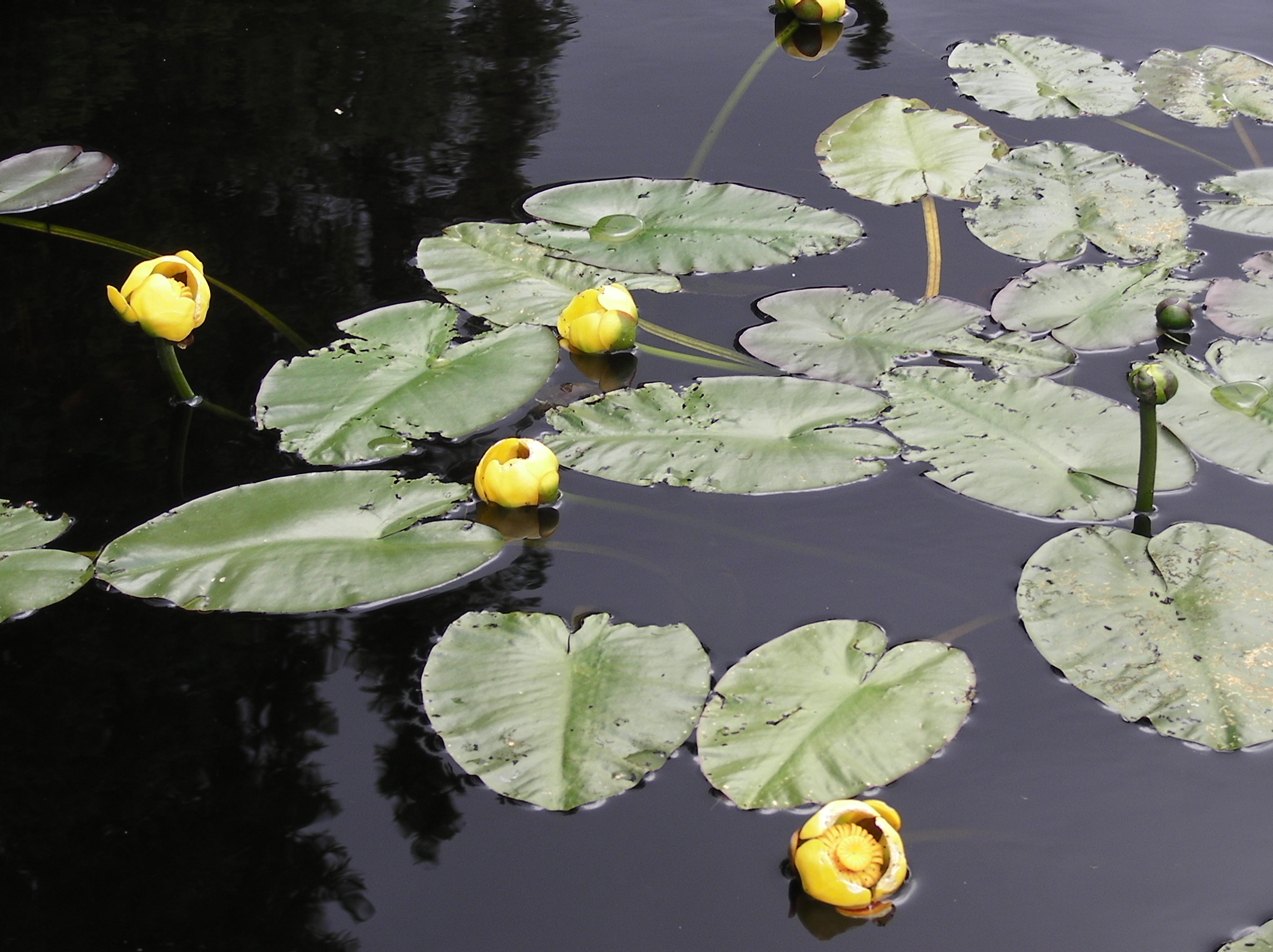 Nénuphar à feuilles panachées. (Julie)